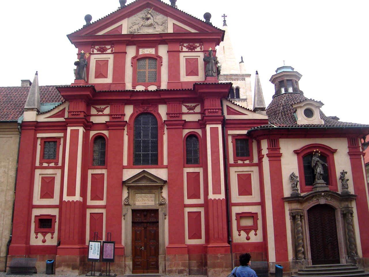 Szent György-bazilika, Prága